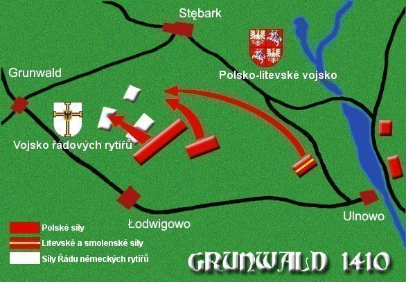 Rozbití řádových vojsk v Grunwaldské bitvě 1410